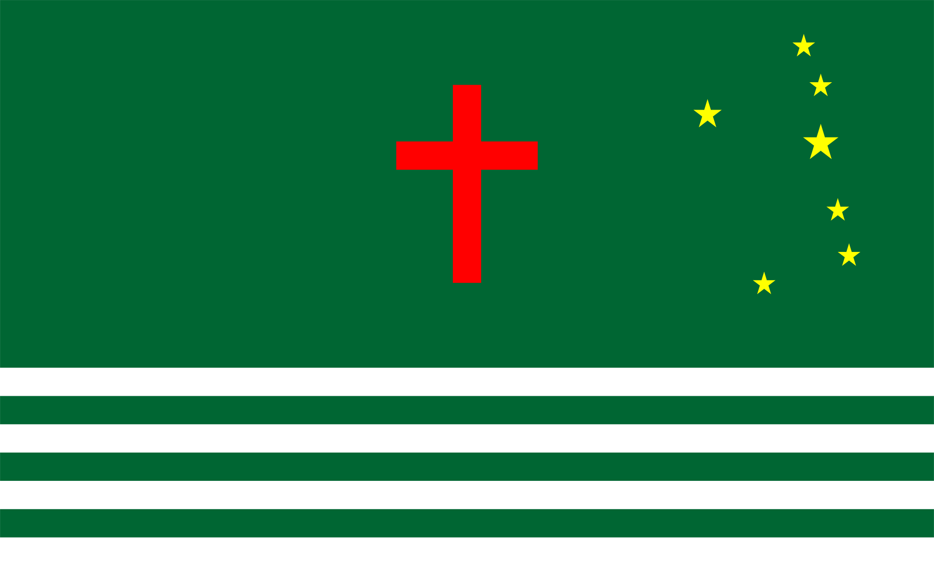 Bandeira de Altinho, Lei Nº 1.223, de 28 de maio de 2012